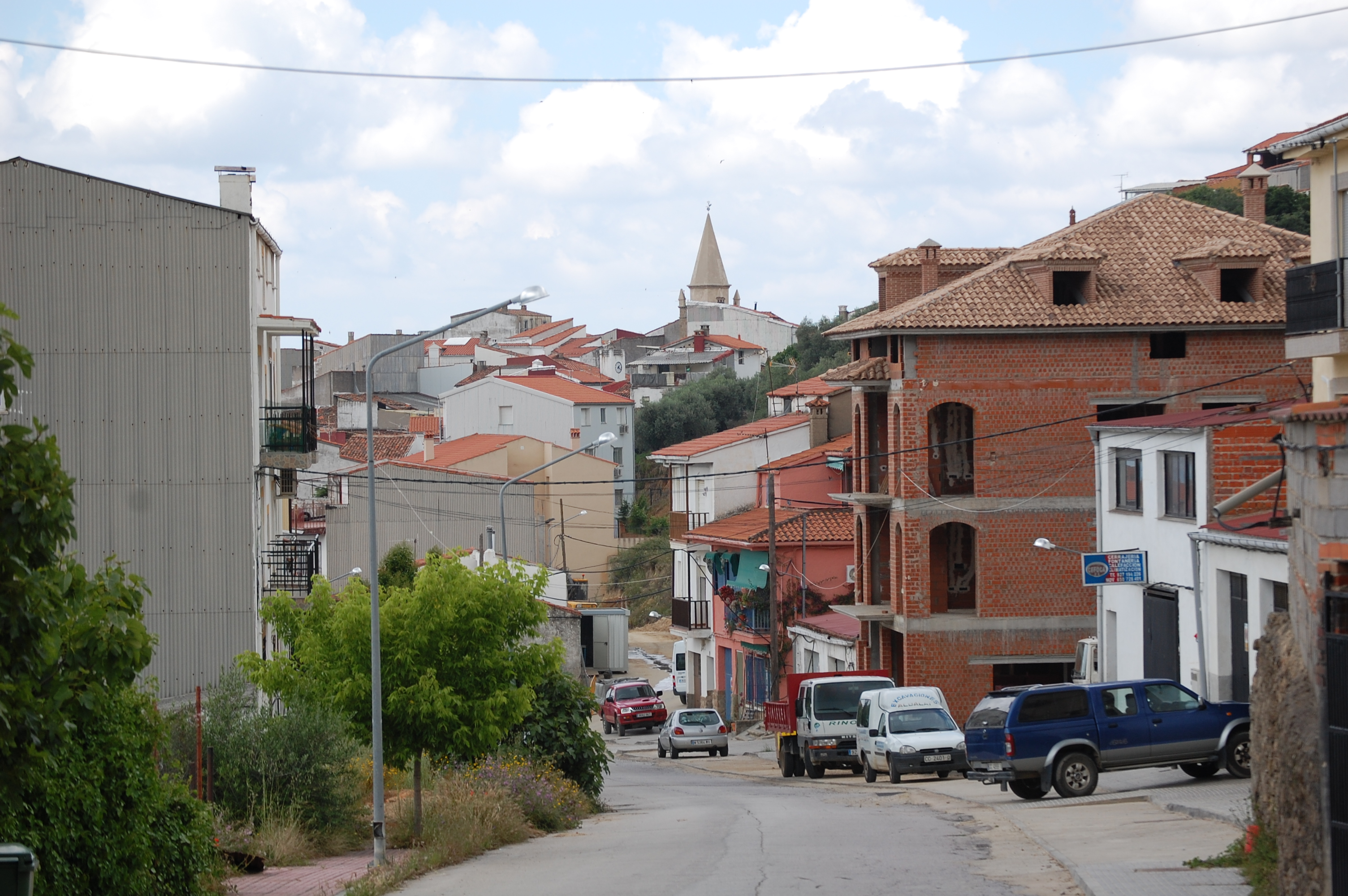 Arroyomolinos de la Vera, provincia de Cáceres, España.